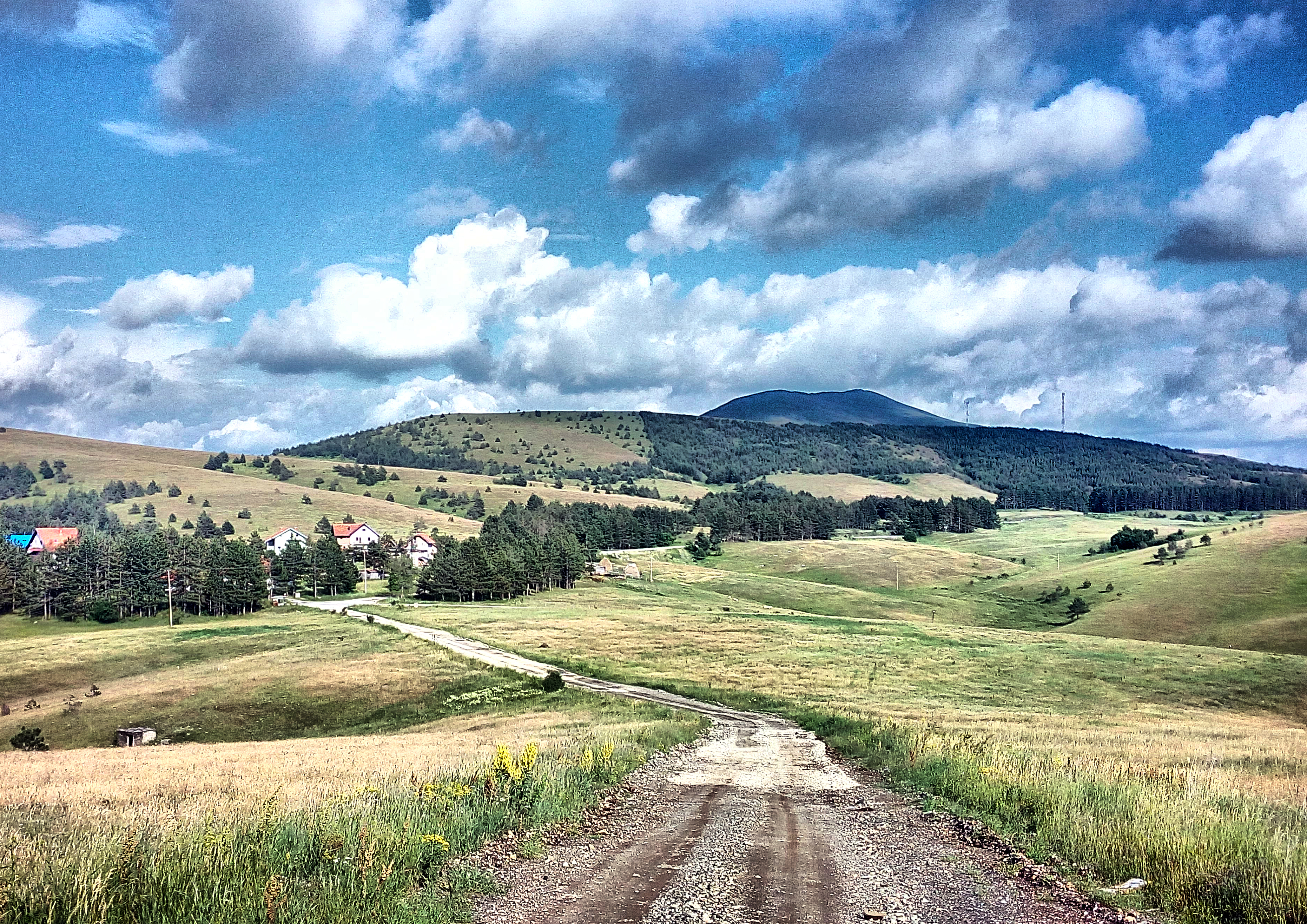 Краљева Вода, Златибор, Serbia